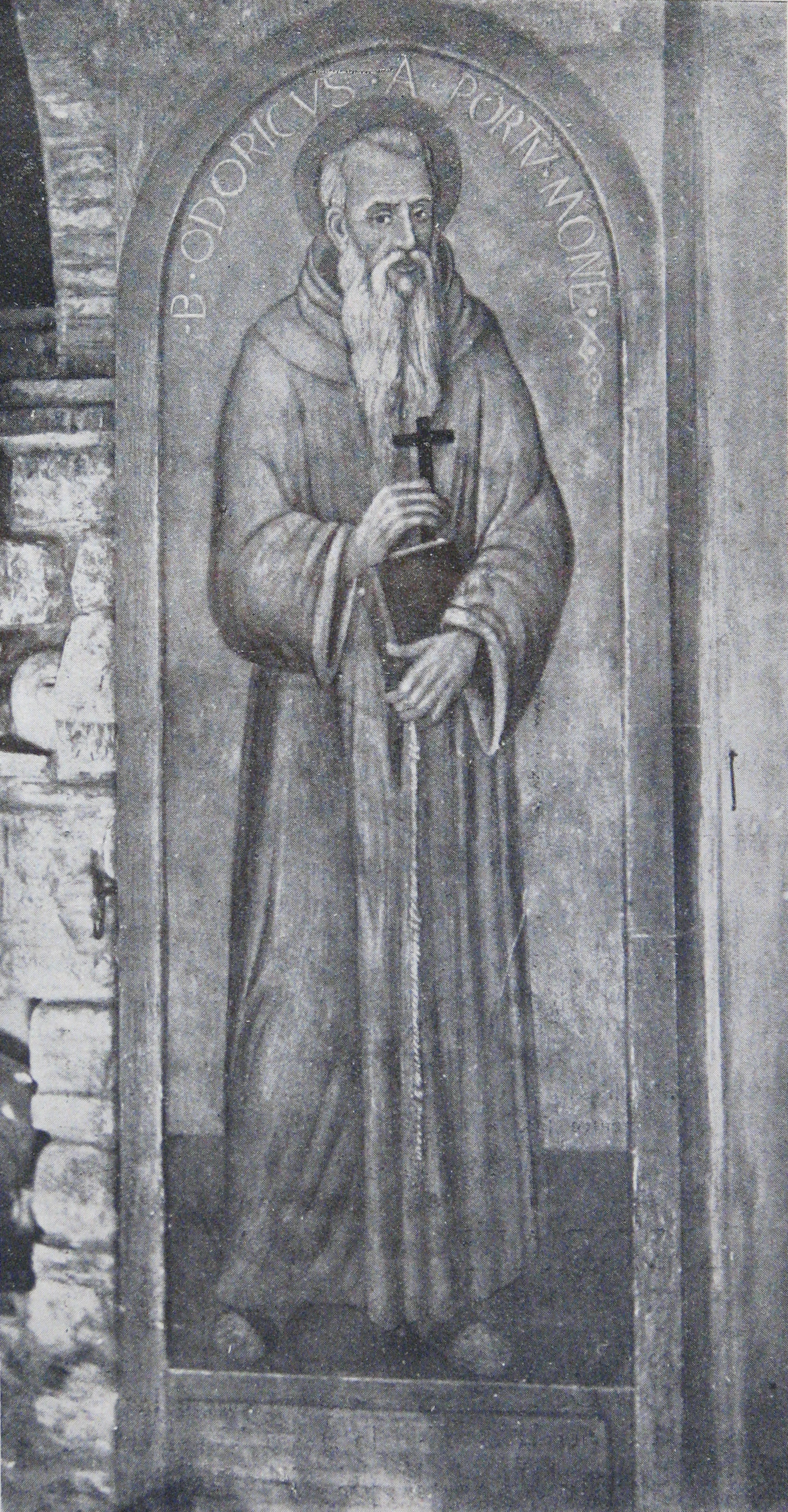 Fresk z kościoła franciszkanów w Fiesole (Włochy) przedstawiający bł. Odoryka z Pordenone.